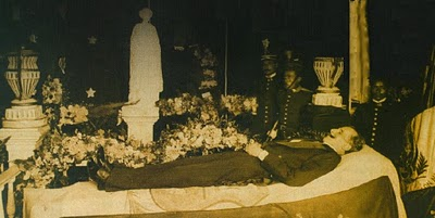 Fotografía de la capilla ardiente en donde se encontraba el cuerpo del presidente Manuel Candamo, Arequipa, 1904.